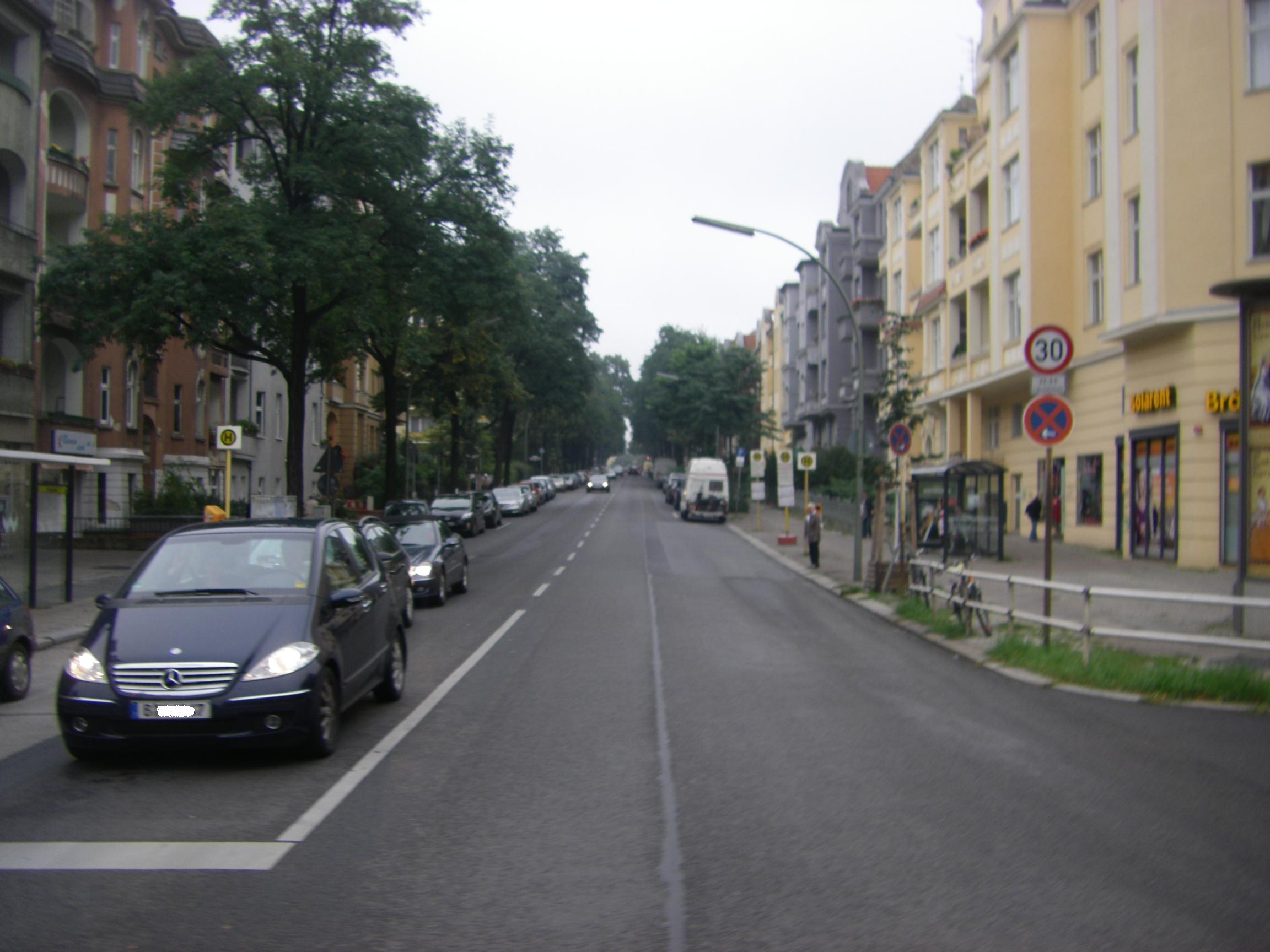 Berlin-Steglitz Halskestrasse